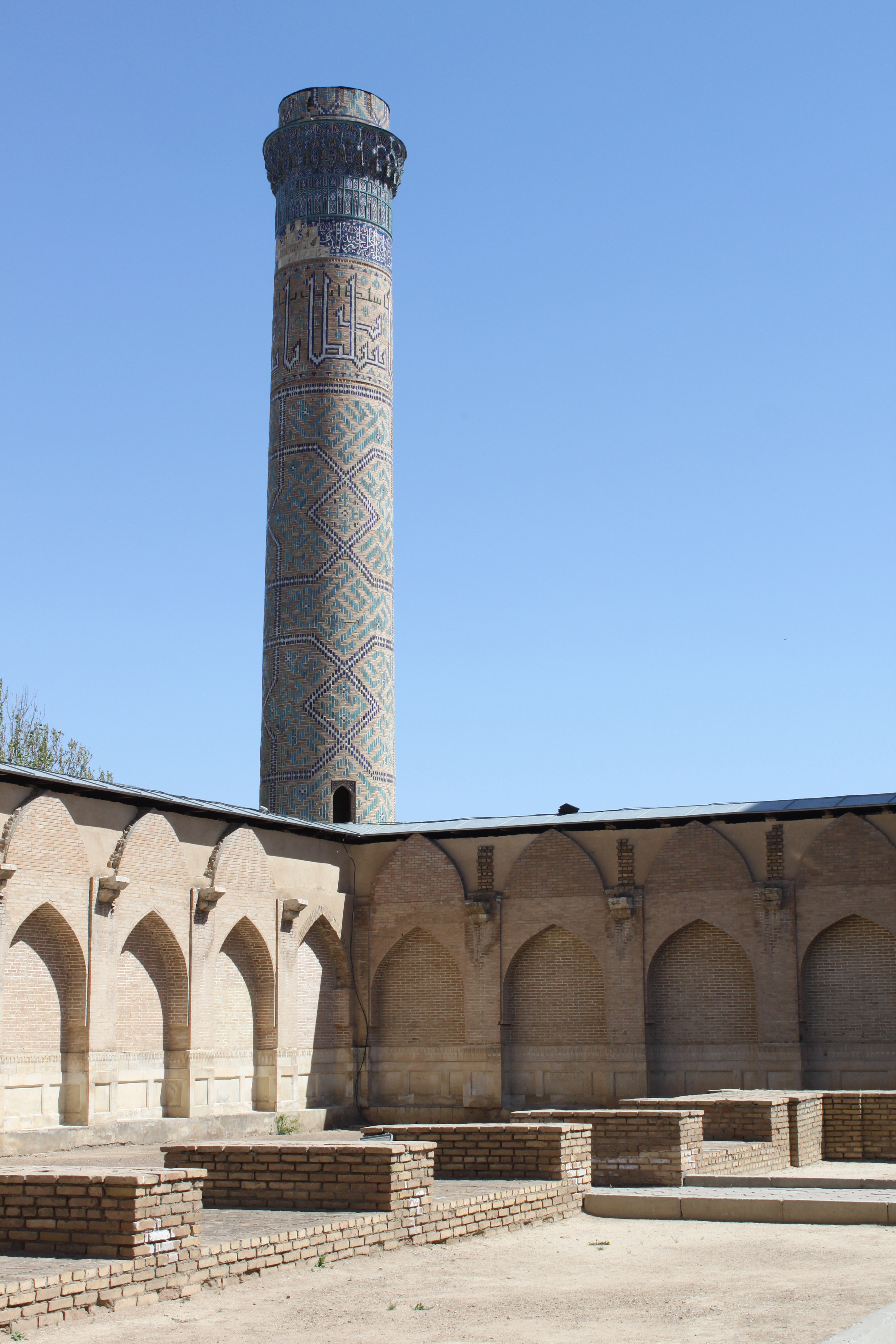 Vue depuis la cour de Bibi Khanoum